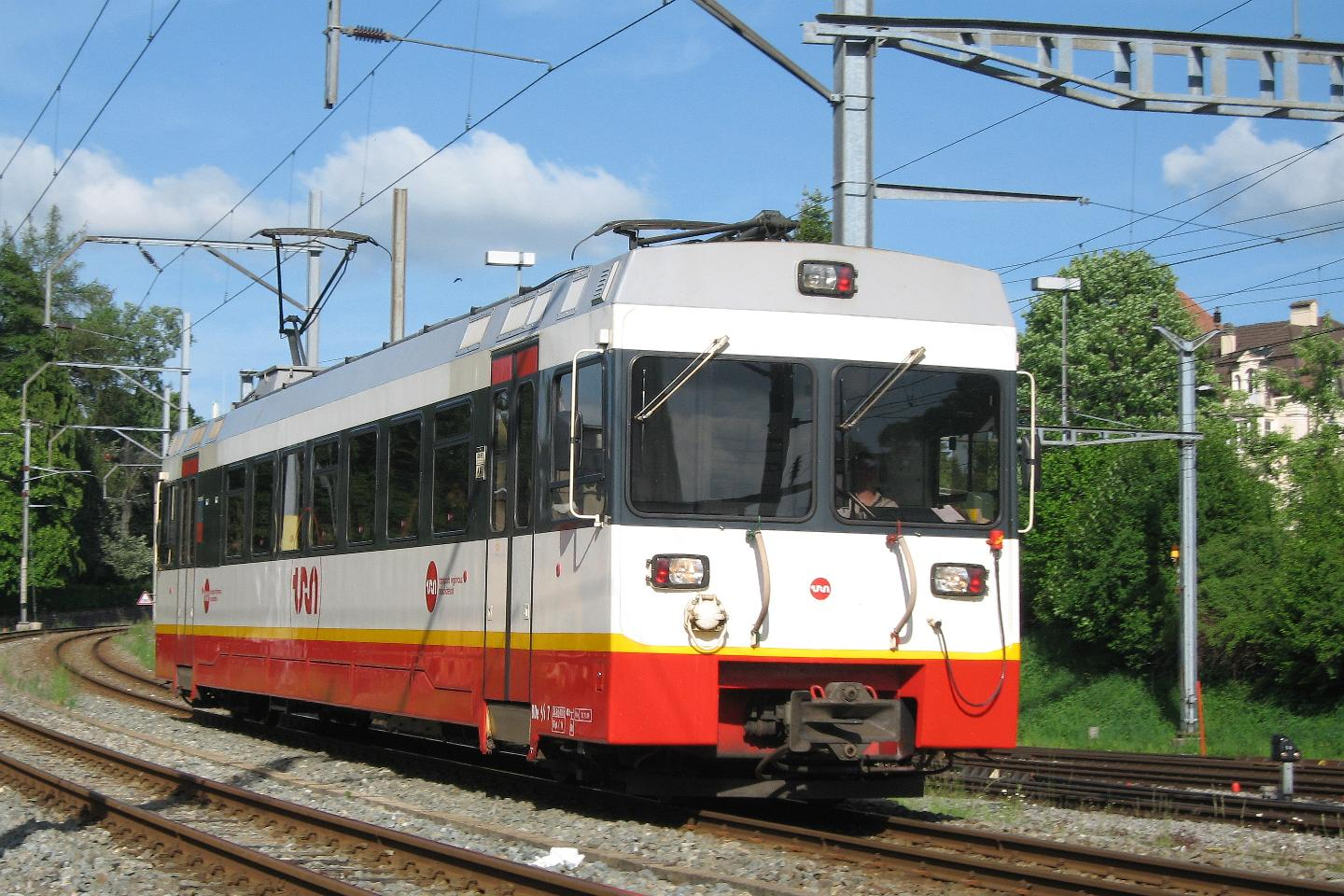 Transports Régionaux Neuchâtelois (TRN) Triebwagen BDe 4/4 7 aus dem Vallée de La Sagne, auch als Vallée des Ponts bezeichnet, fährt in den Bahnhof La Chaux-de-Fonds ein.